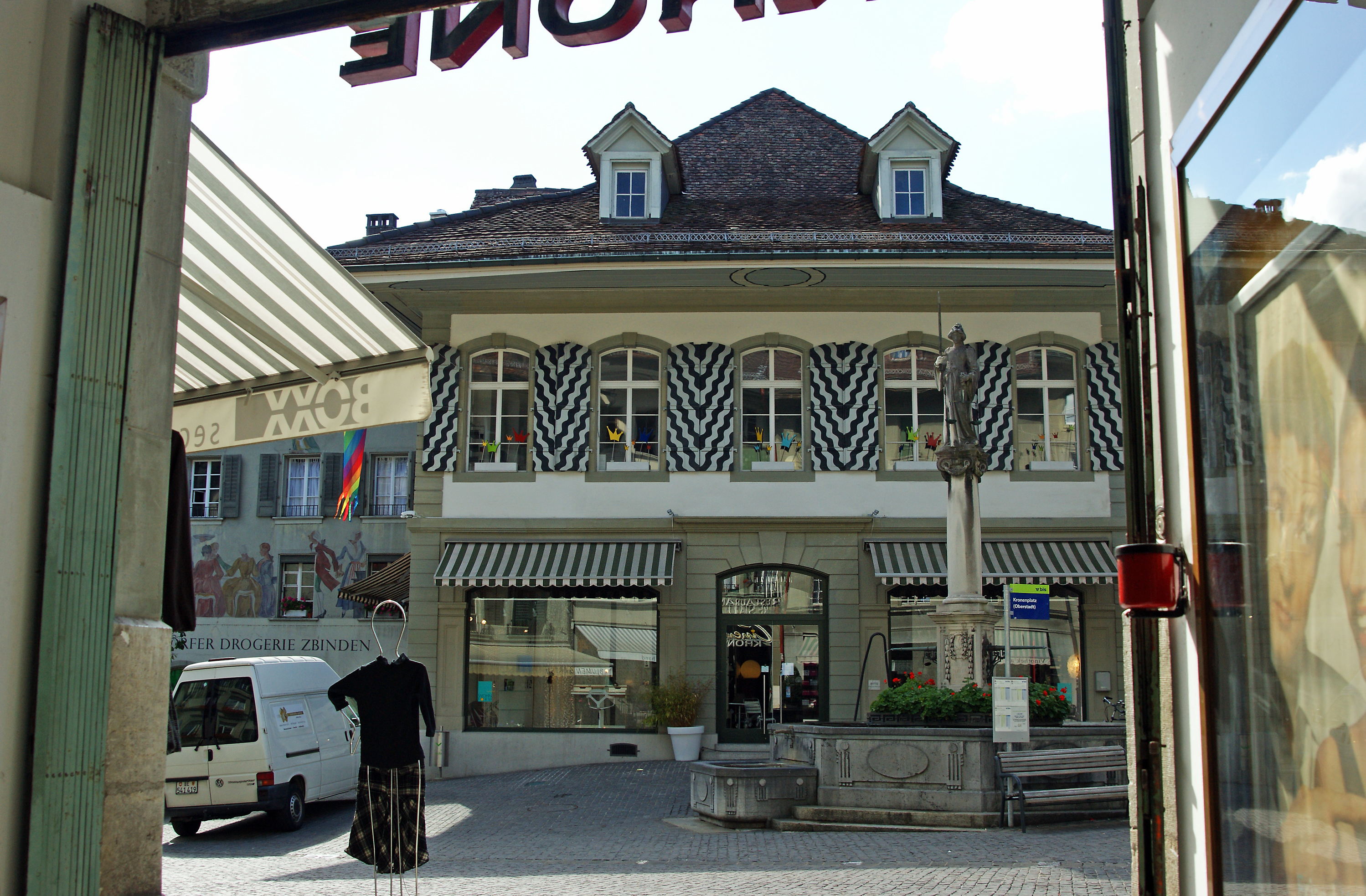 Blick aus der Kronenlaube auf dem Kronenplatz in der Altstadt Burgdorf, Kanton Bern